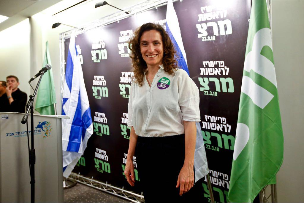 ענת ניר ביום הבחירות ליו"ר מרצ, 2018